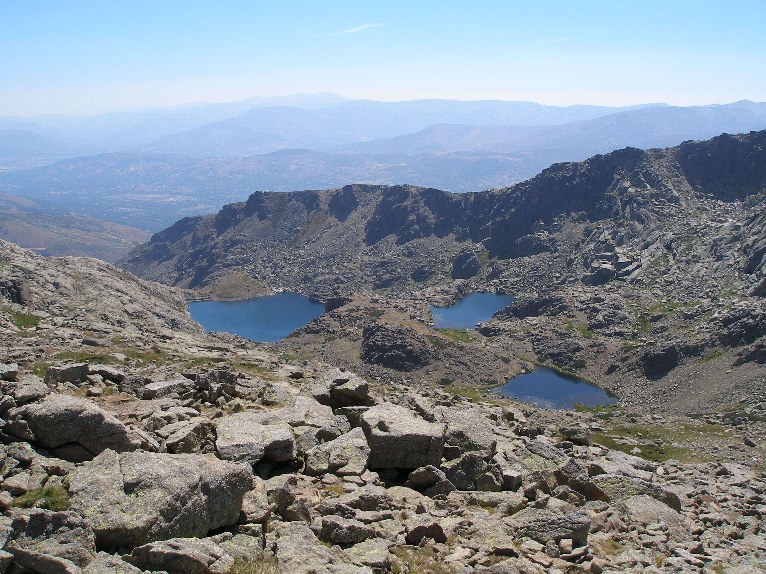 En la sierra de Gredos (Ävila)